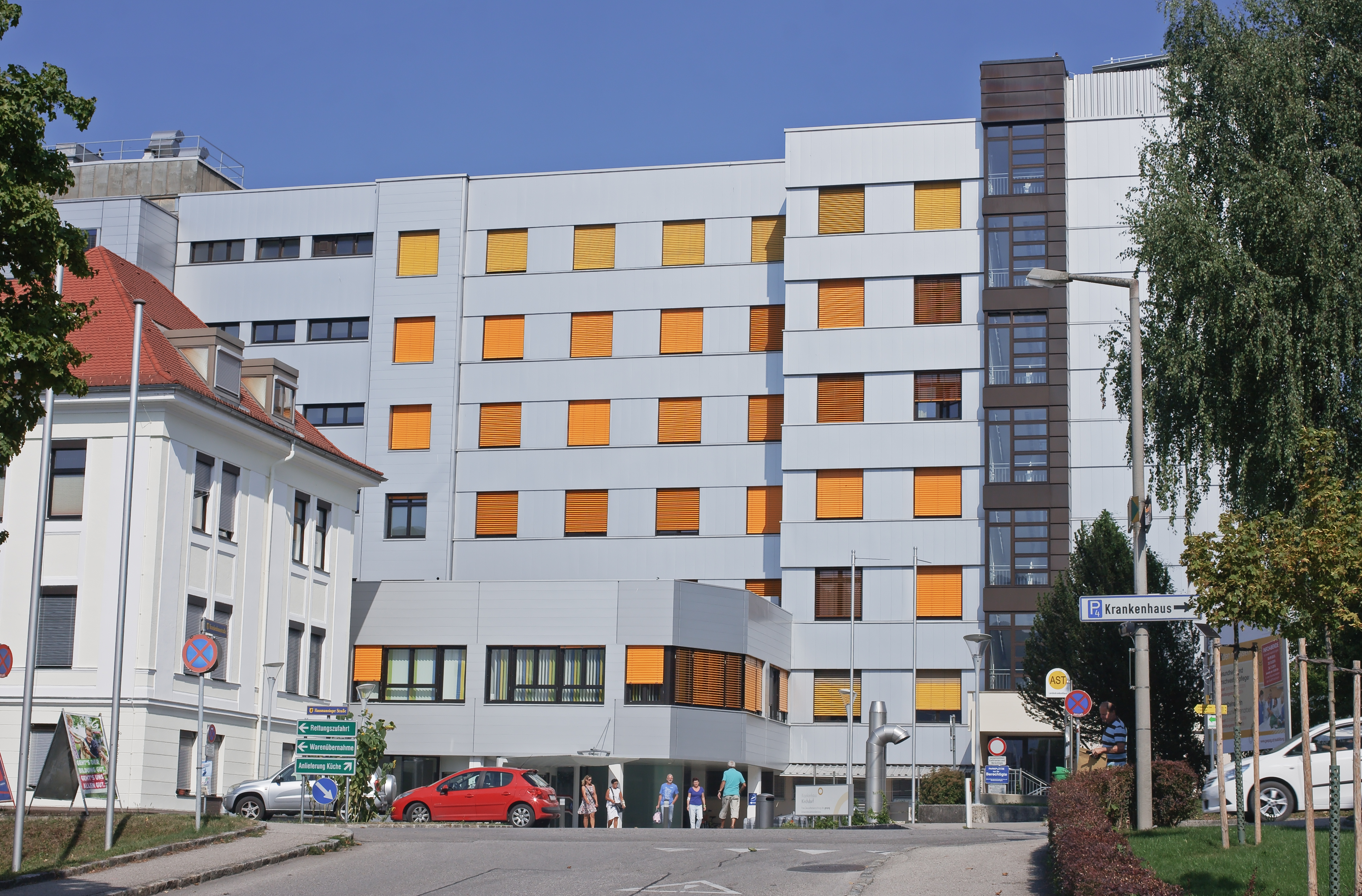 Das Landeskrankenhaus in Kirchdorf an der Krems.